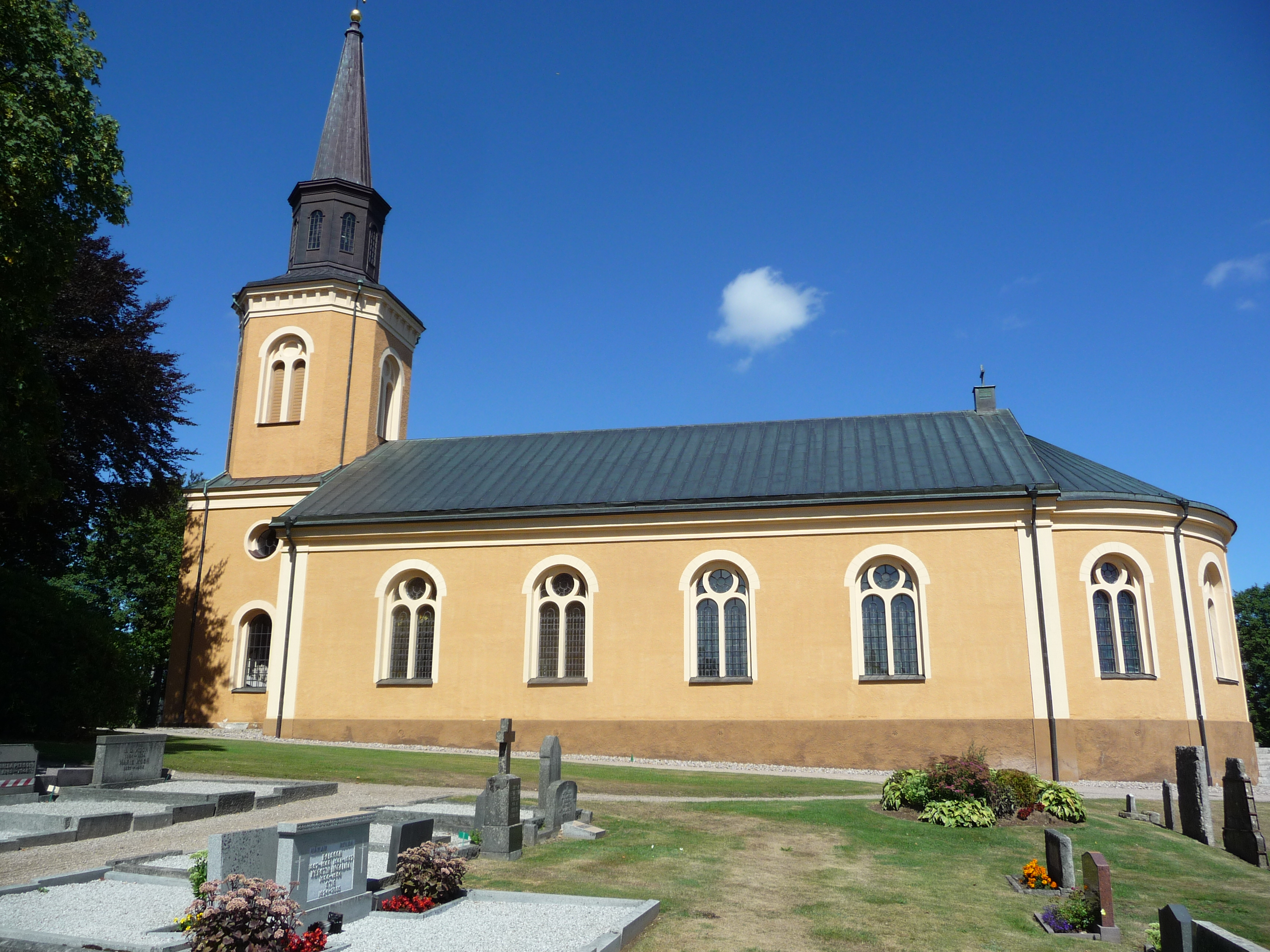 Norra Åkarps kyrka